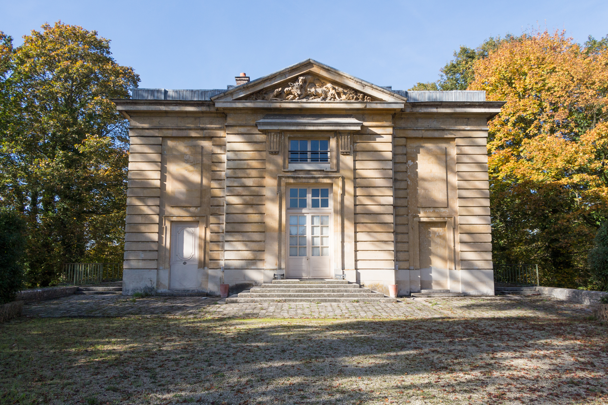 Pavillon du Butard, Architecte : Ange-Jacques Gabriel, Pavillon de chasse de Louis XV